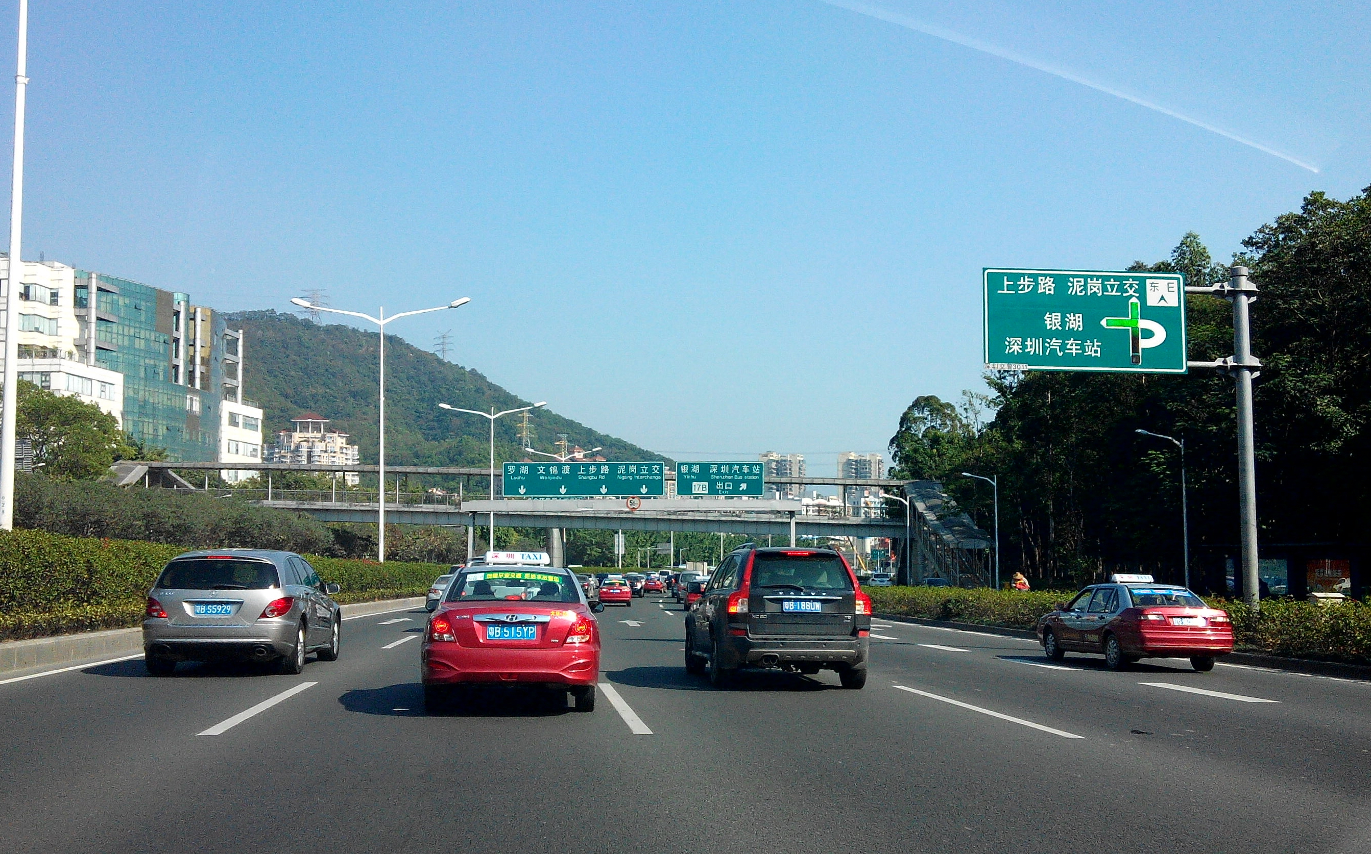 深圳北环大道银湖段